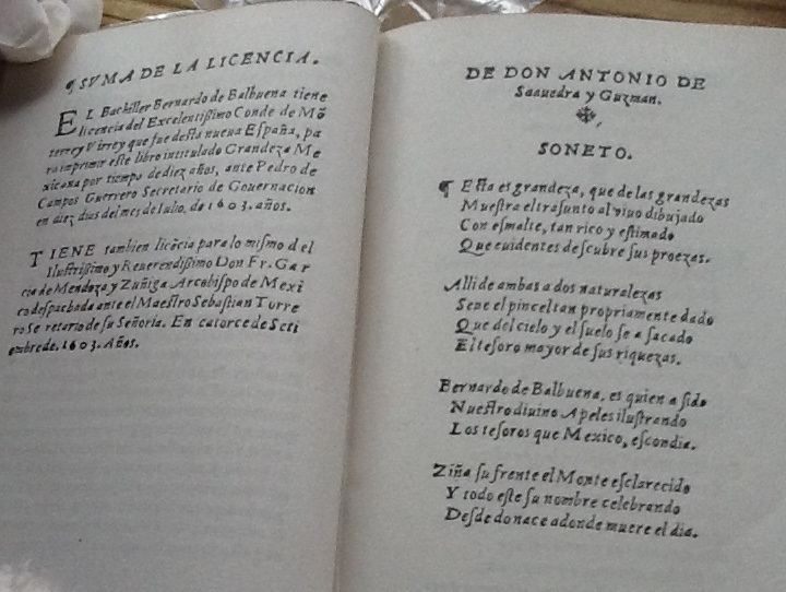 Poema laudatorio presente en la edición de 1604 por Ocharte